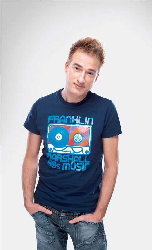 Dennis Verheugd (Velsen, 1 mei 1972) is een Nederlandse radio-dj die voor Radio 10 Gold en Radio 538 werkt. Als zijn pseudoniem DJ Devious verzorgt hij remixprogramma's op Radio 538 en bracht hij enkele platen uit.